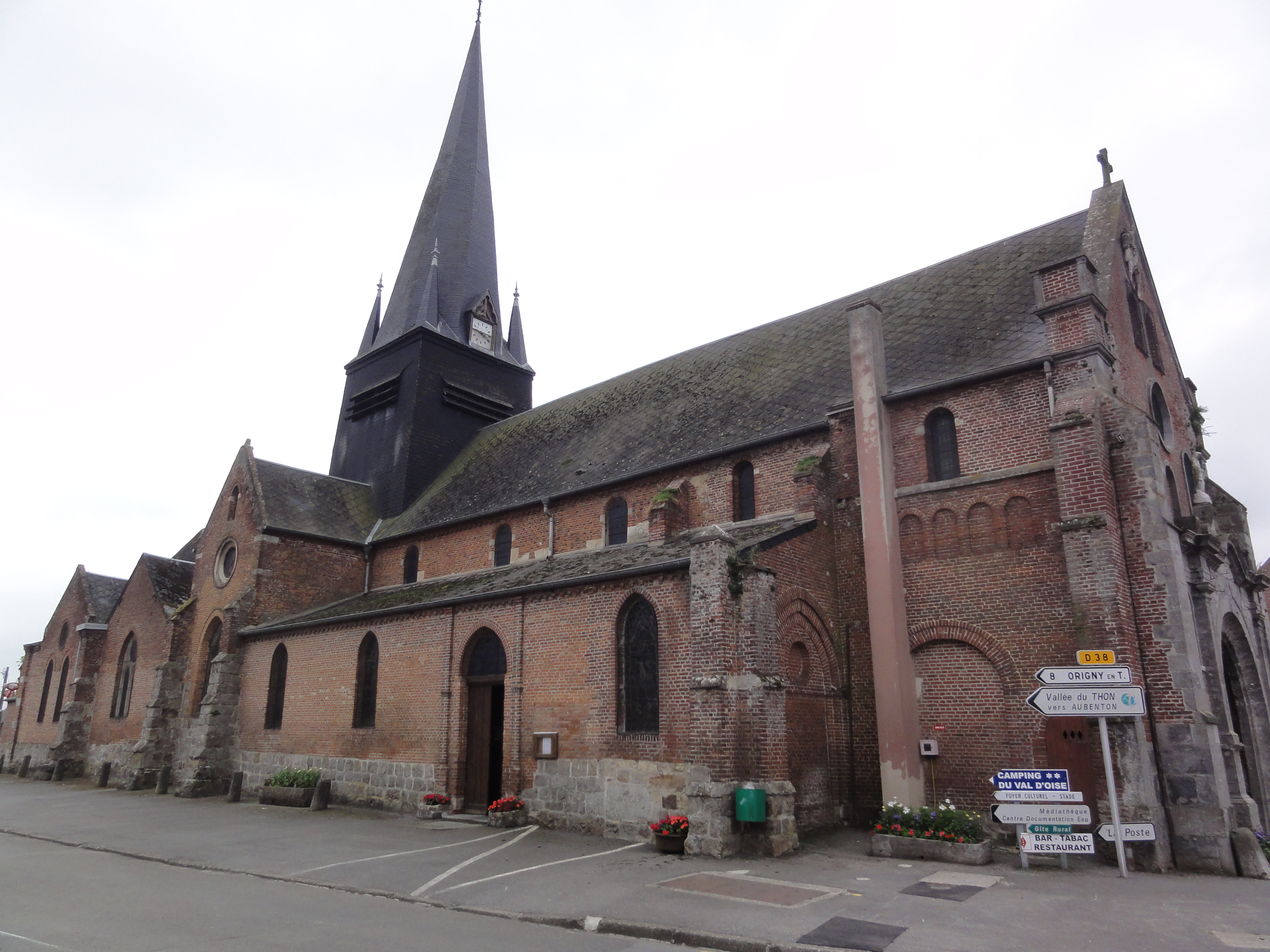 Étréaupont (Aisne) Église Saint-Martin, latéral